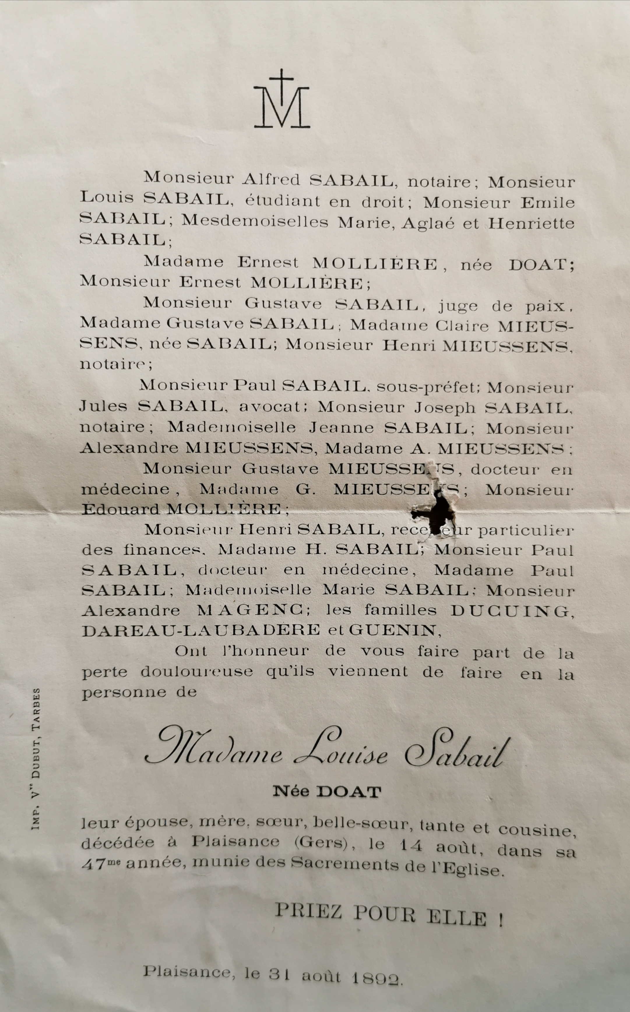 Faire part de décès de Louise Doat-Sabail du 31 août 1892, présence de son cousin Alexandre Magenc, qui fera son éloge funébre.